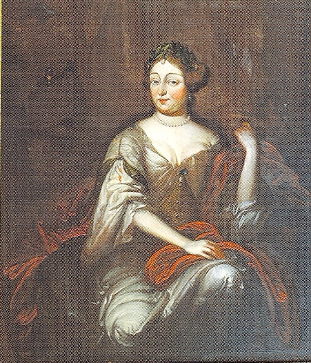 Anna Sophia von Sachsen-Gotha-Altenburg (1670-1728), Frau von Ludwig Friedrich I. (Schwarzburg-Rudolstadt)